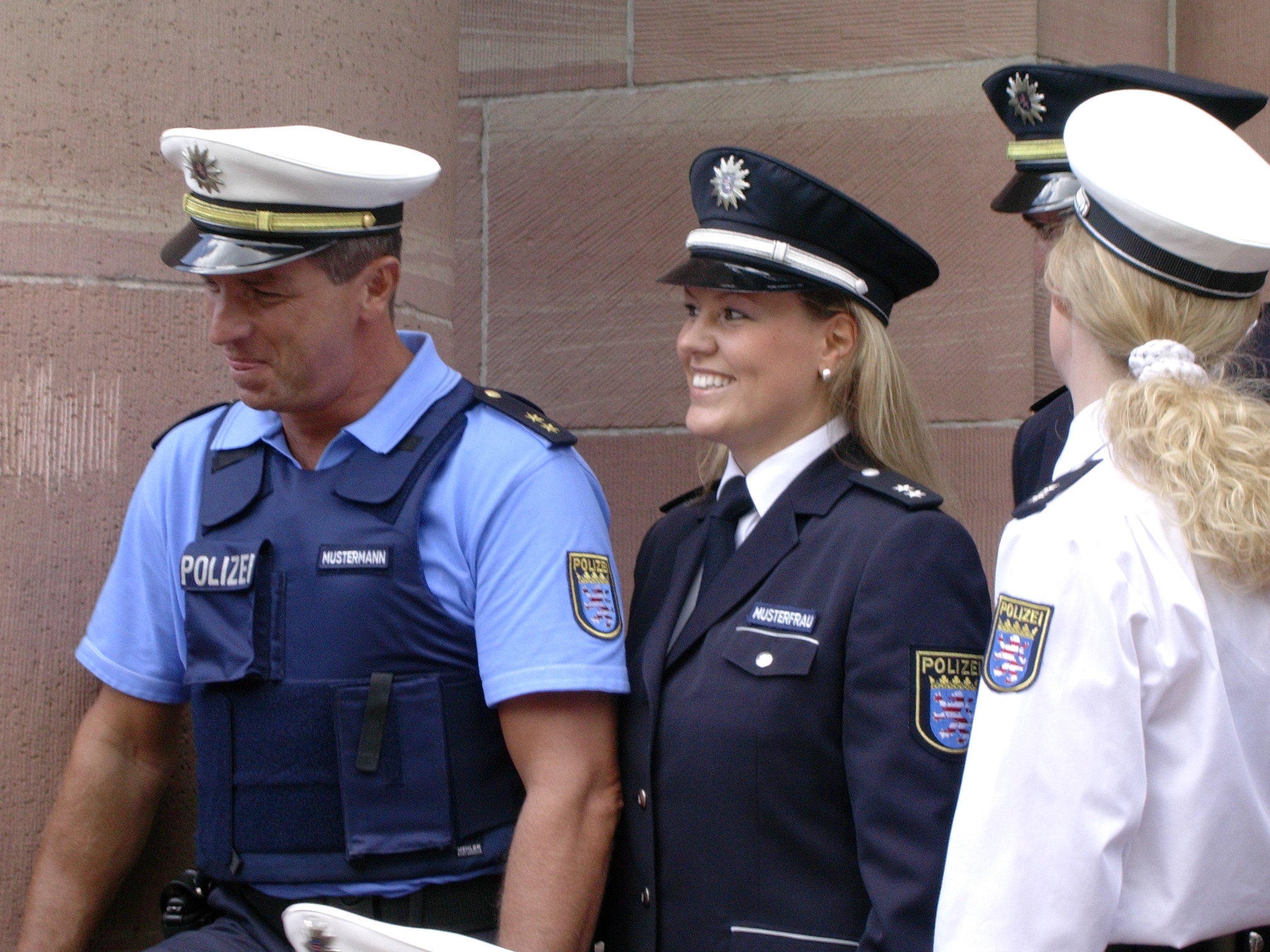 Neue blaue Uniform der Polizeien der Länder Hessen, Rheinland-Pfalz und Thüringen